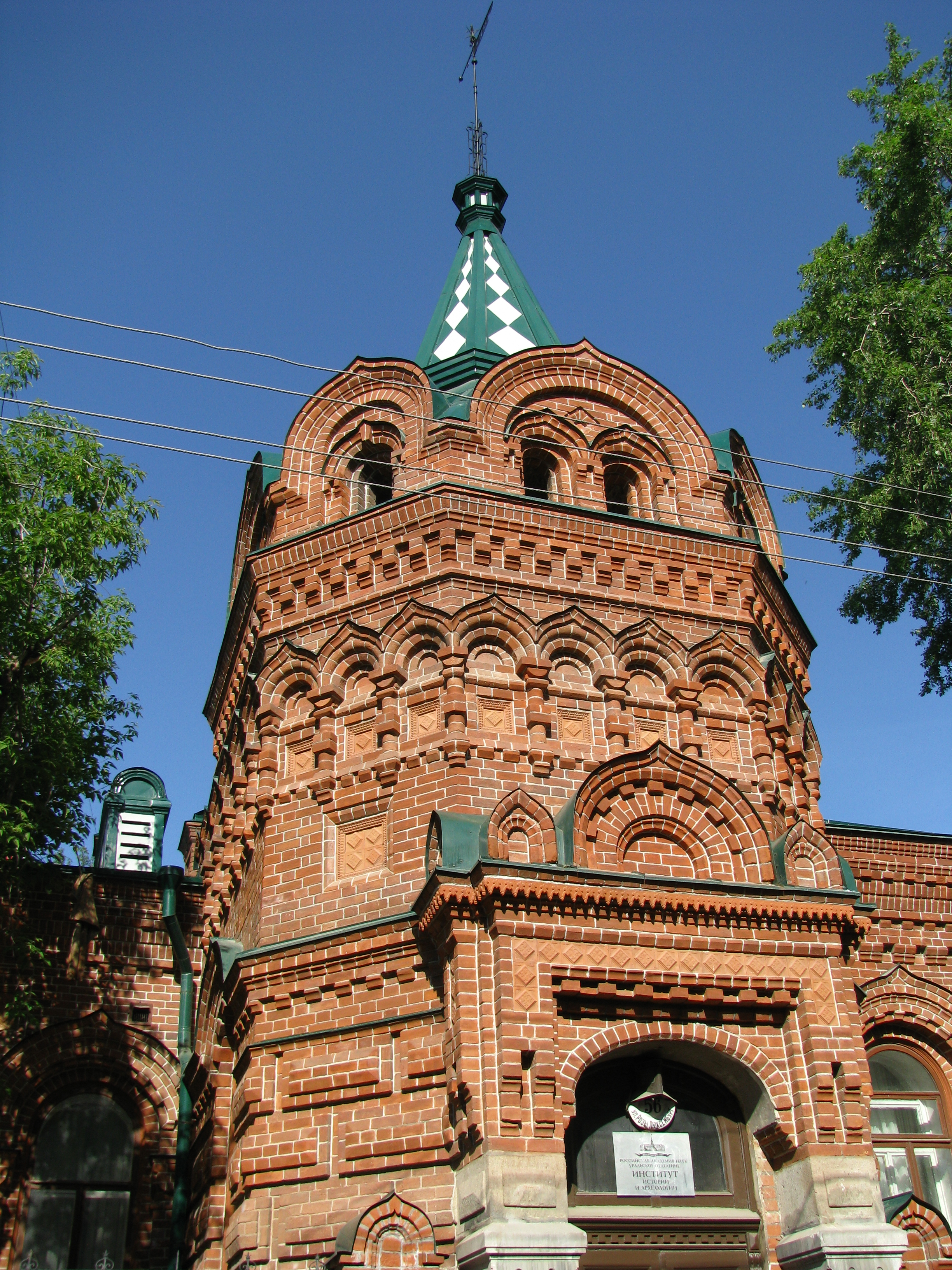 Вход в усадьбу Железнова